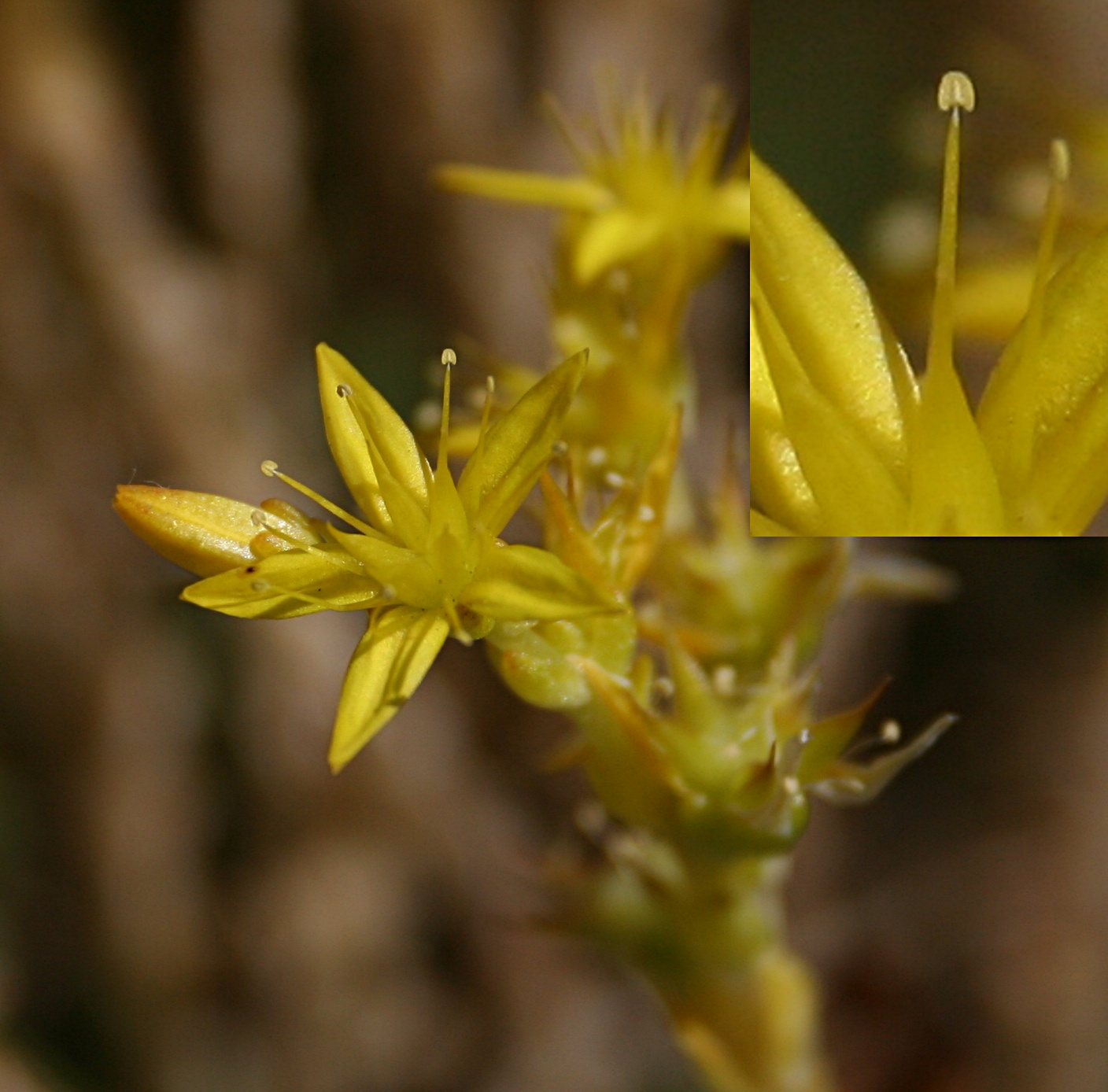 Kwiat rozchodnika ostrego